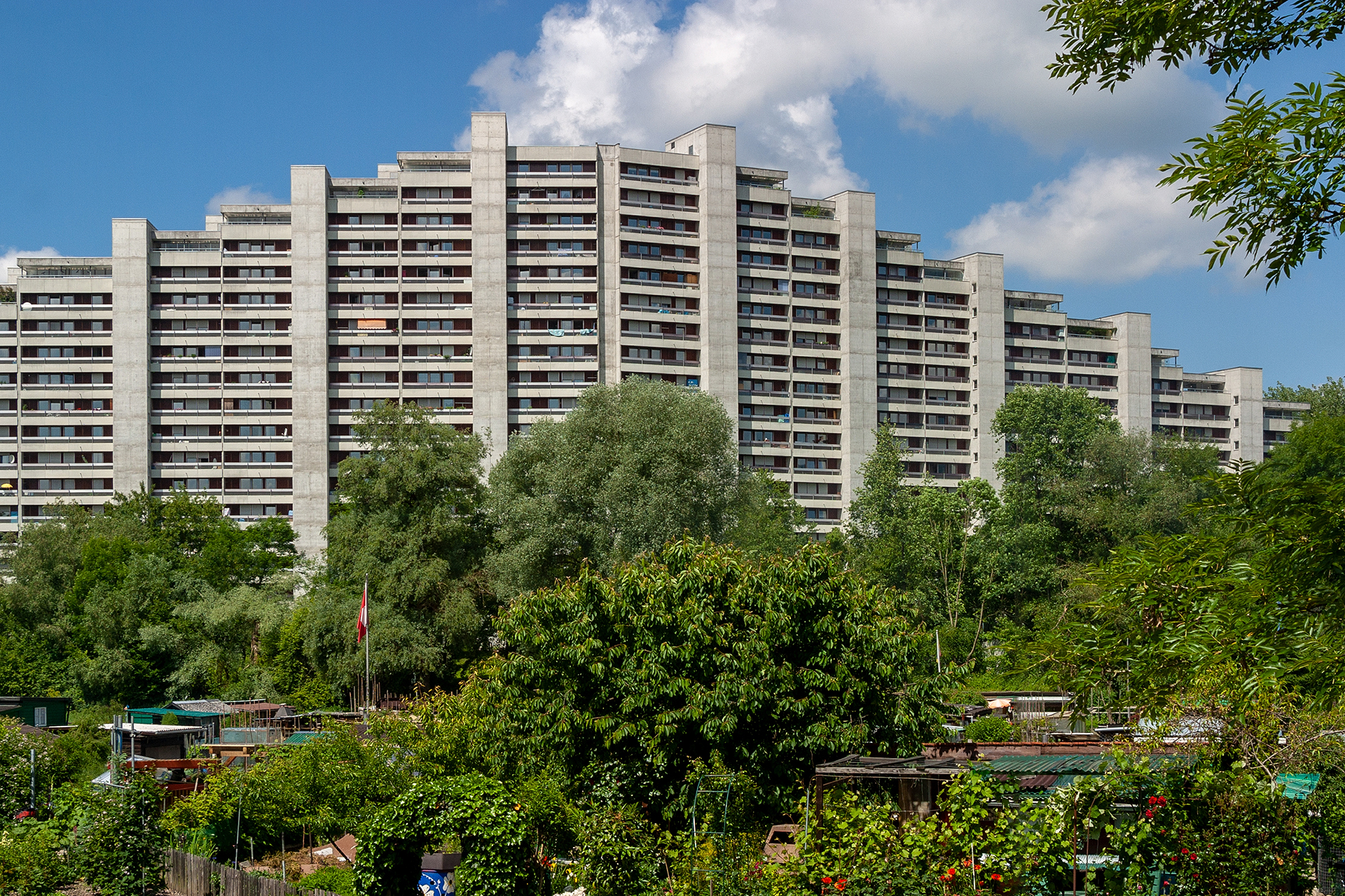 Wohnüberbauung Telli in Aarau